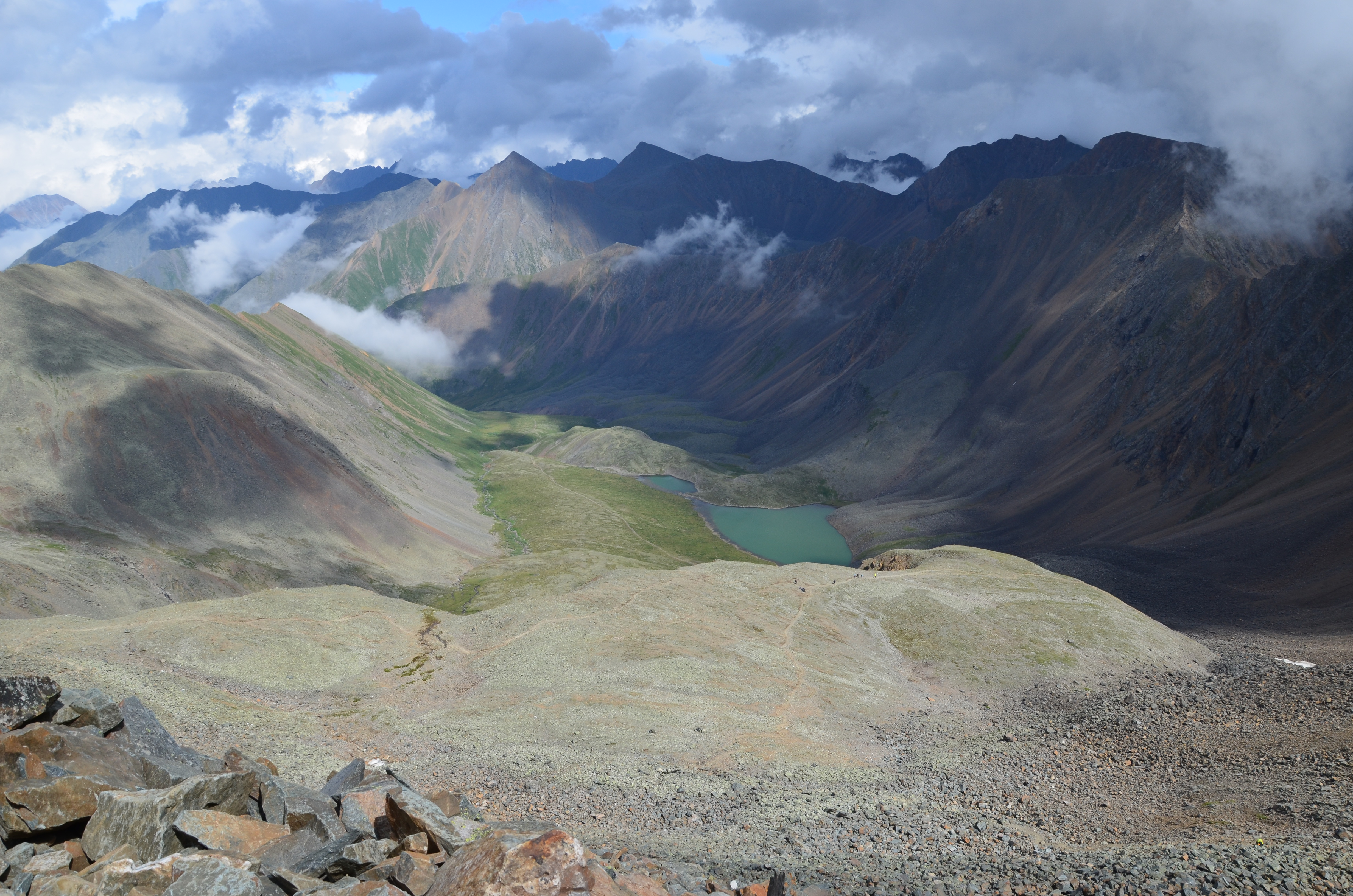 Россия. Республика Бурятия. Перевал Шумакский на пешеходном маршруте к Шумаку.